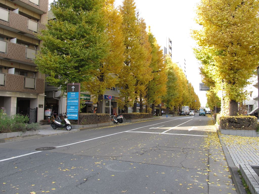 東京都府中市 Fuchu-city, Tokyo